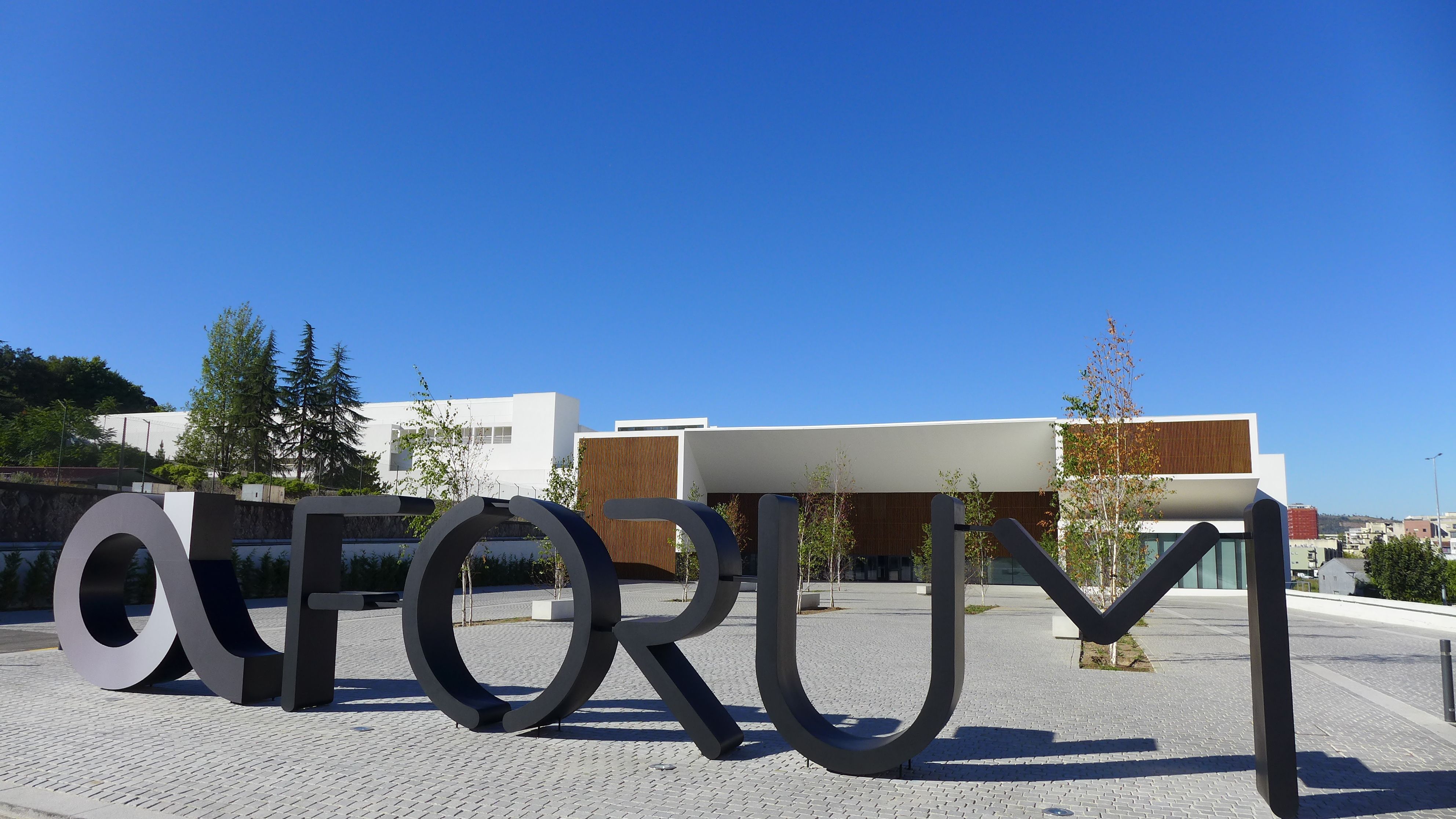 Entrada Principal do Altice Forum Braga